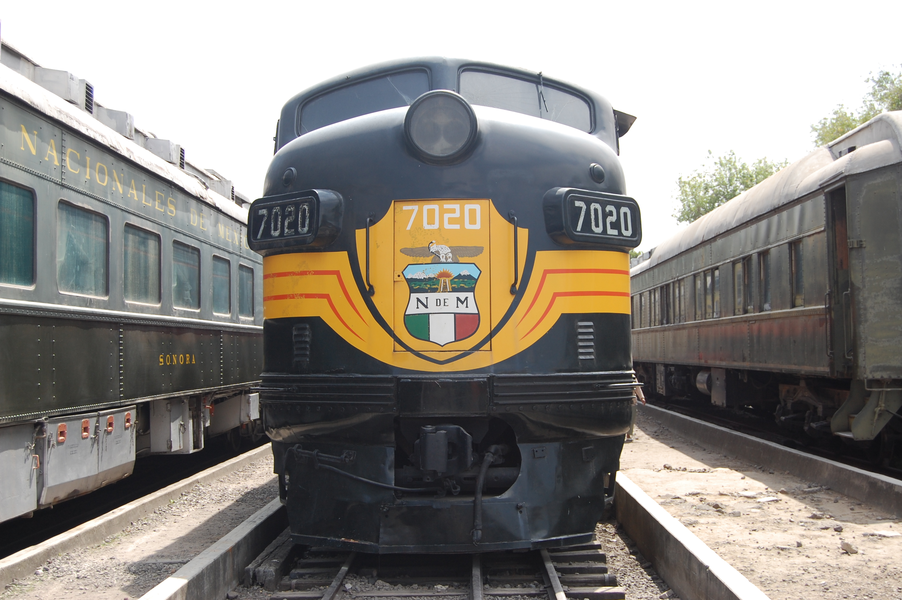 Museo Nacional de los Ferrocarriles Mexicanos, Puebla, an NdeM FP9A